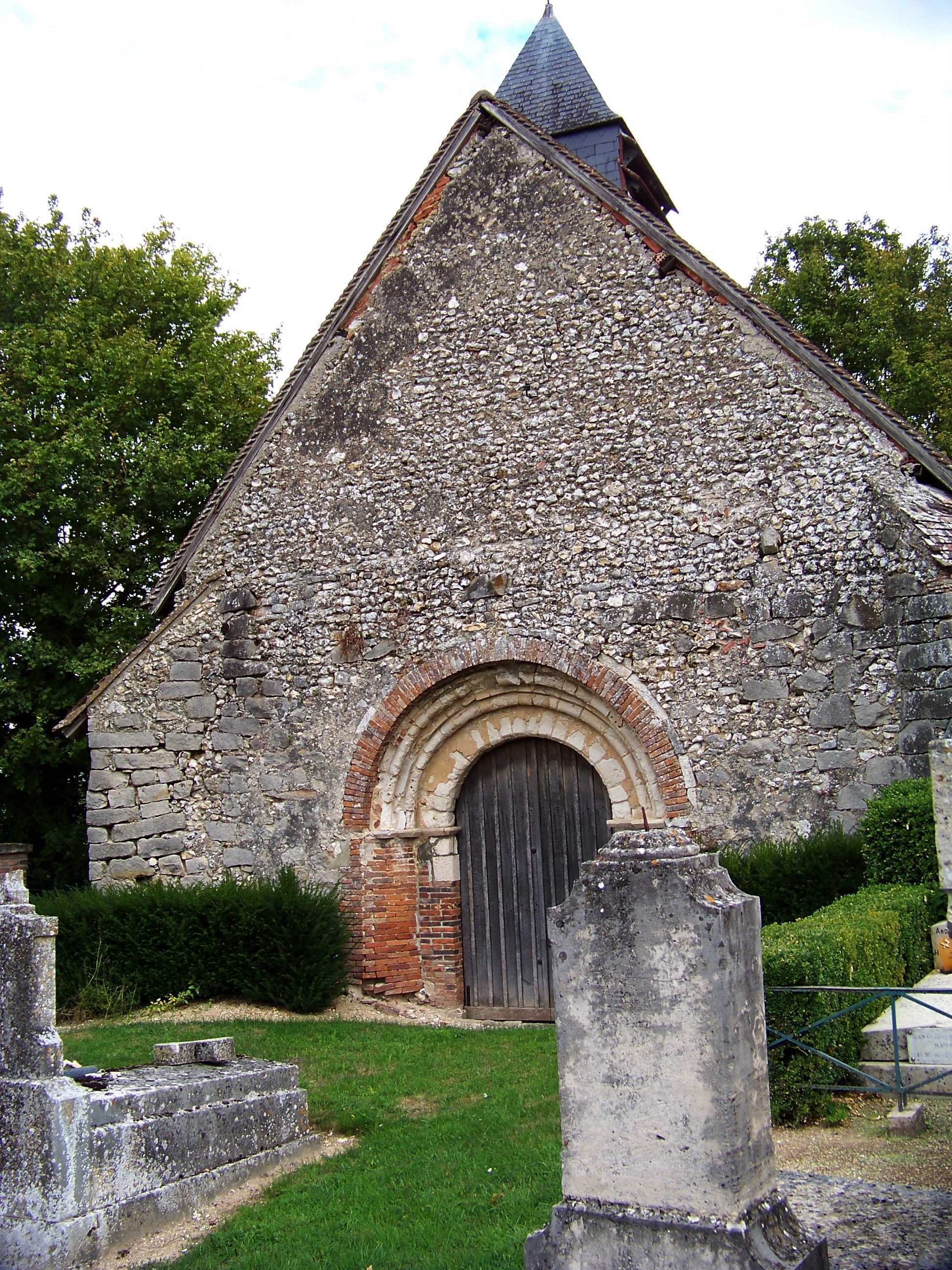 Chapelle Saint-Gengould